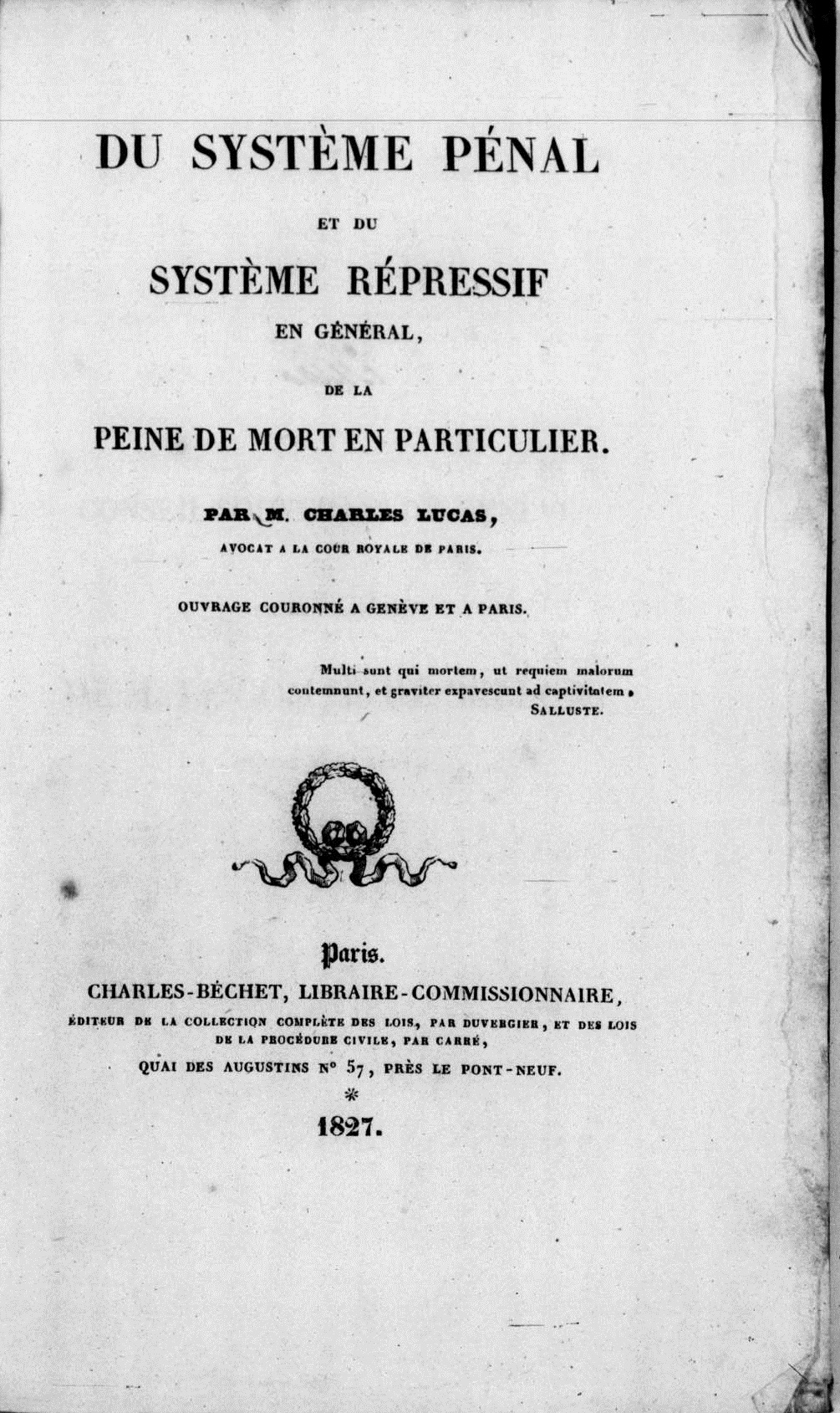 Frontespizio